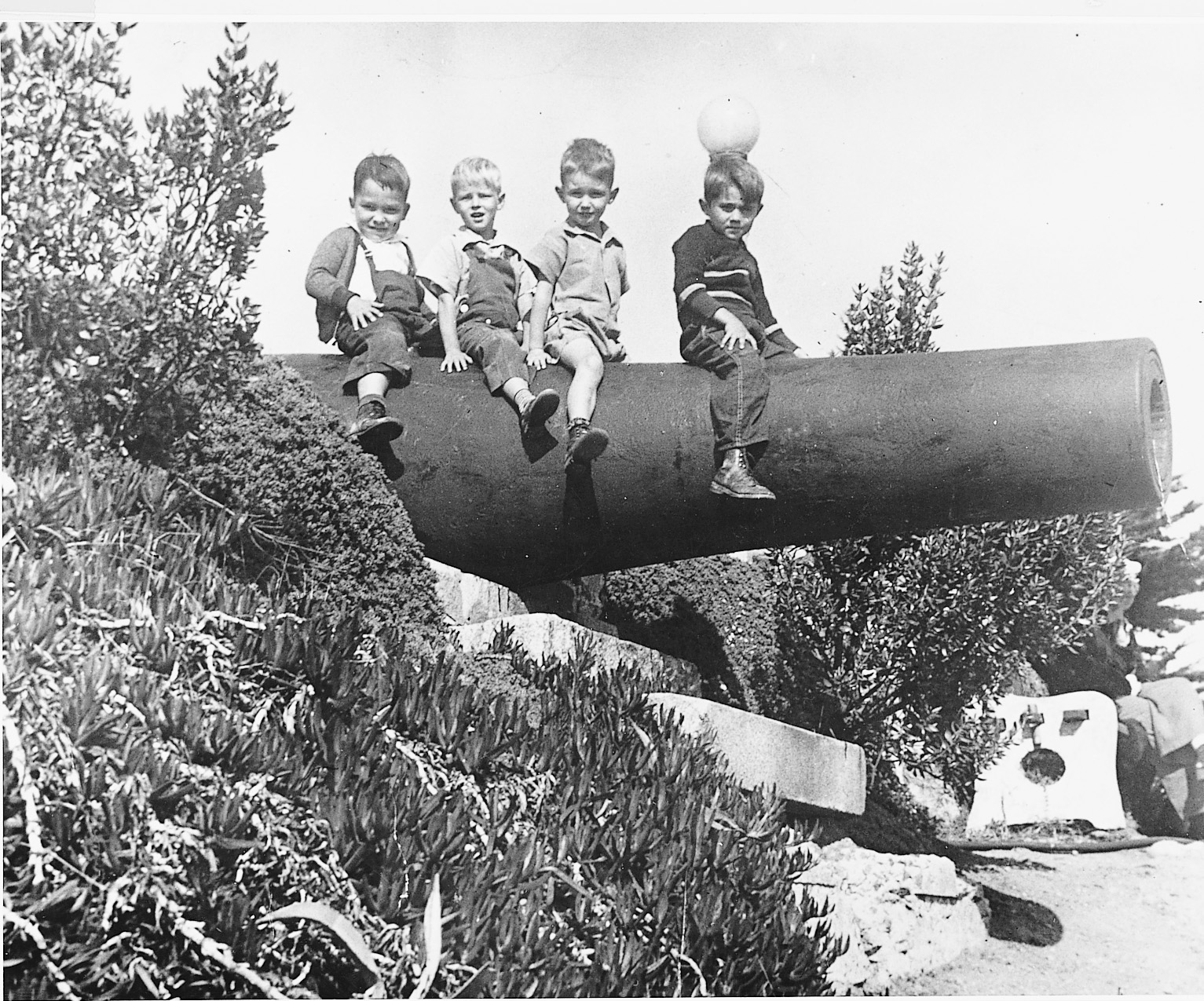 Alcatraz Island cannon